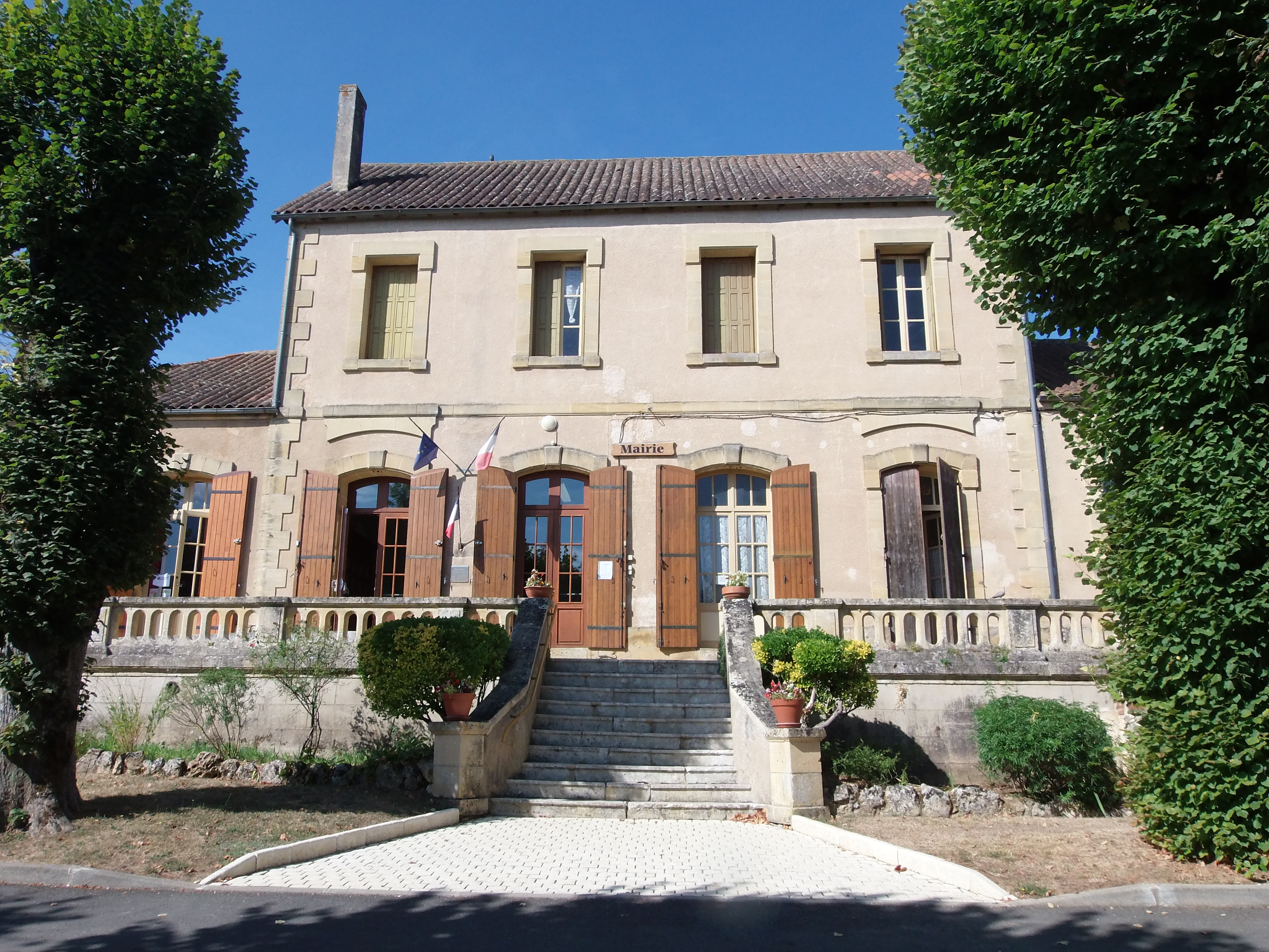 Mairie de Liorac-sur-Louyre, commune française située en Dordogne.